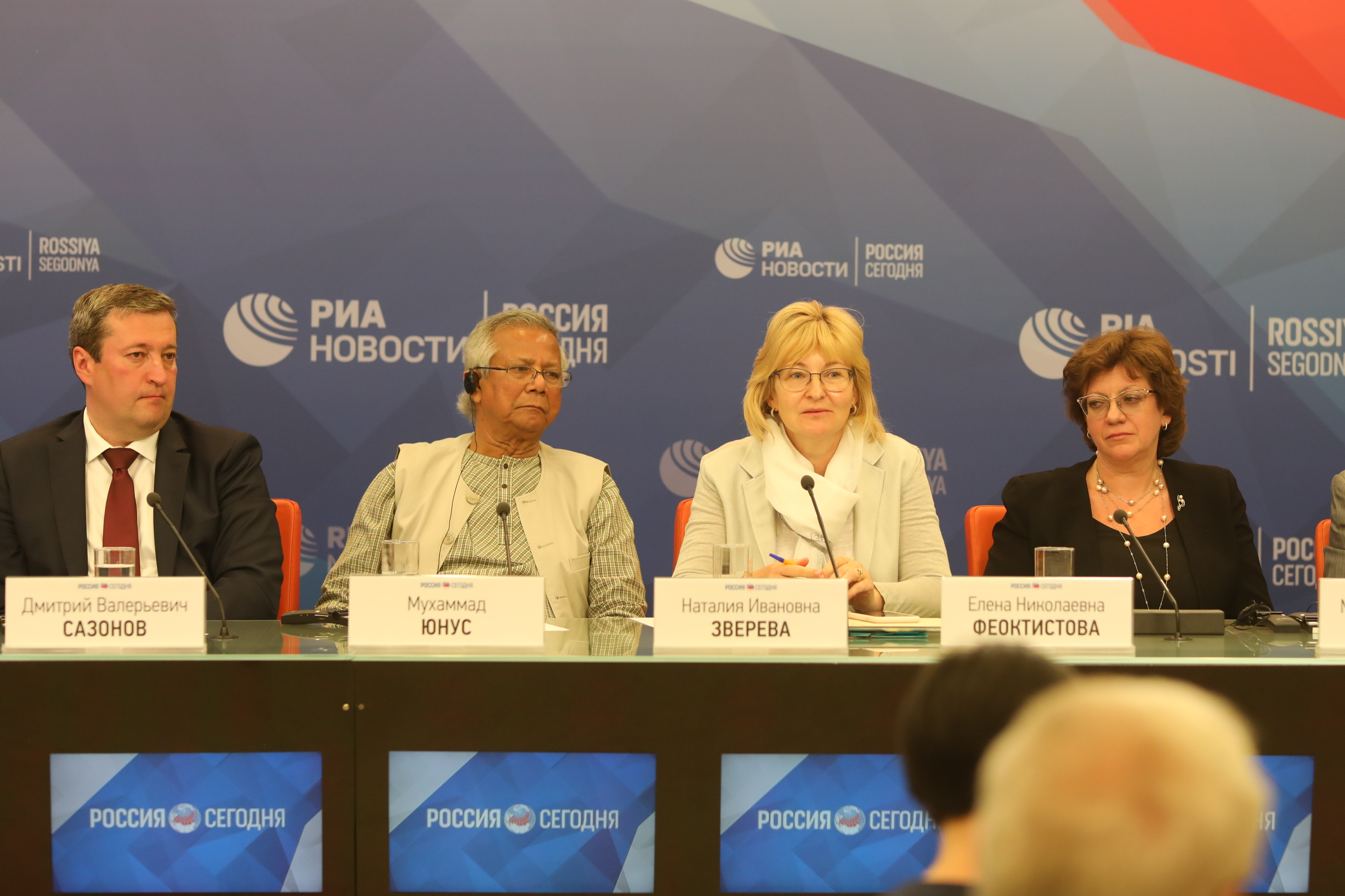 Пресс-конференция «Социальное предпринимательство в России – будущее страны», организованная Фондом социальных региональных программ «Наше будущее», 2 июля 2019 года, г. Москва.